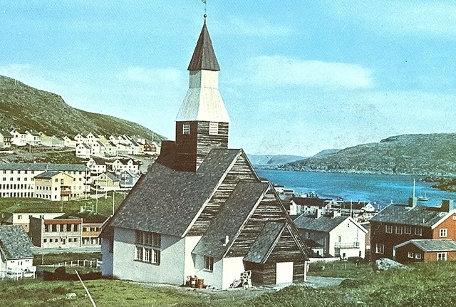 Havøysund kirke